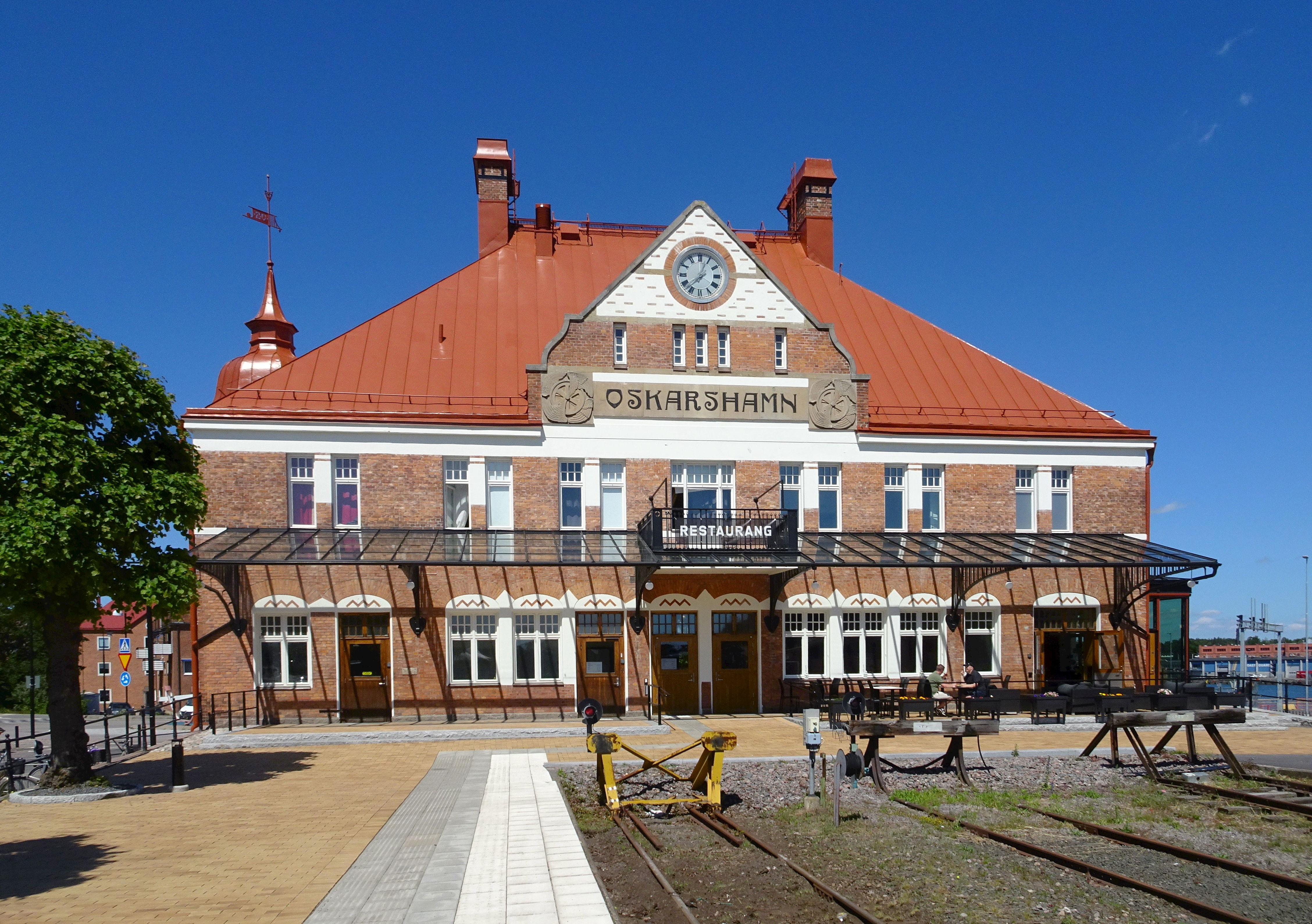 Oskarshamns stationshus